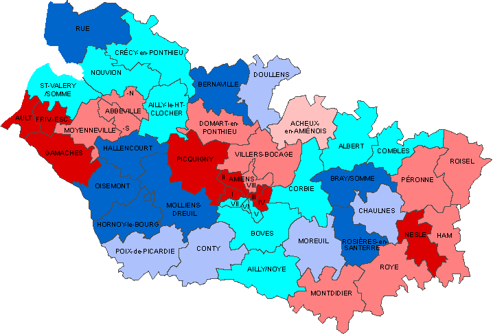 Conseil général en 2000